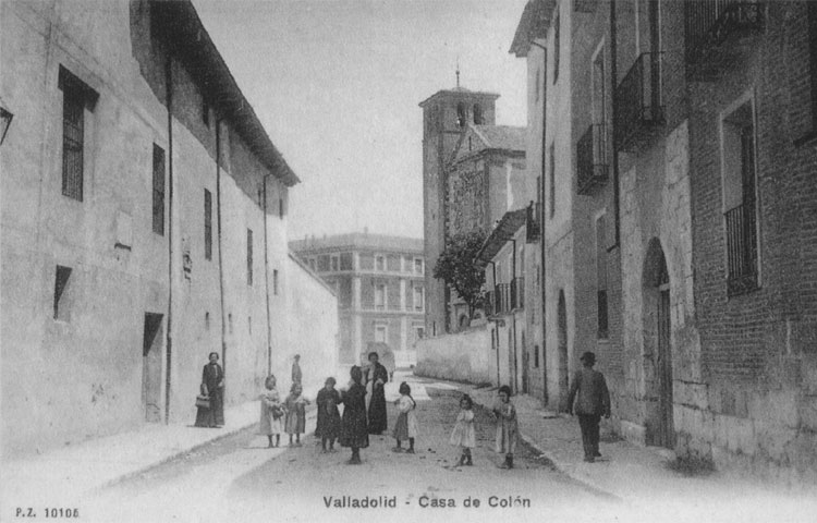 Casa de Colón - Valladolid - Colección Valladolid, postales para el Recuerdo, editada por el Diario El Mundo de Valladolid. Casa de Cristóbal Colón. Al fondo Iglesia de la Magdalena y Facultad de Medicina. - Fotografía. Papel 140 x 90 B/N